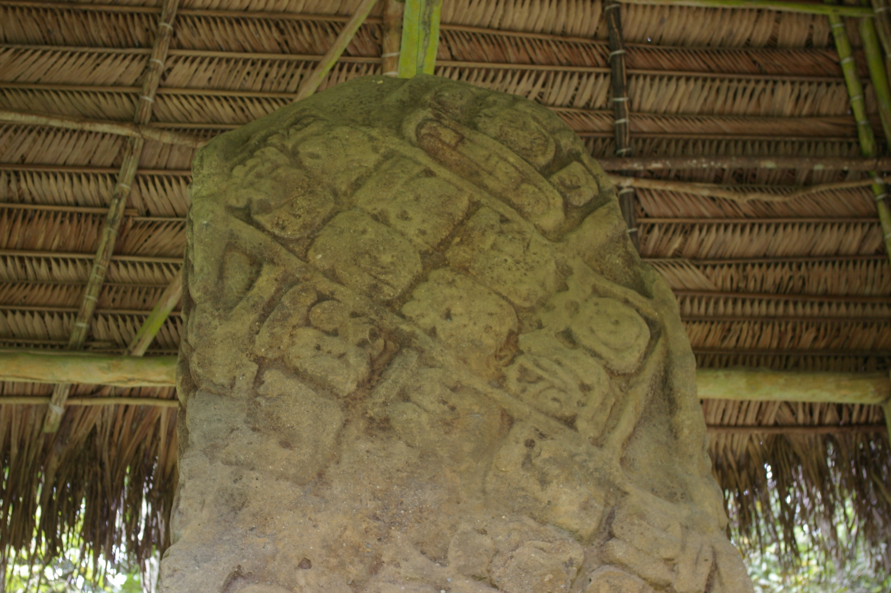 Stela H, east side, from Quirigua.